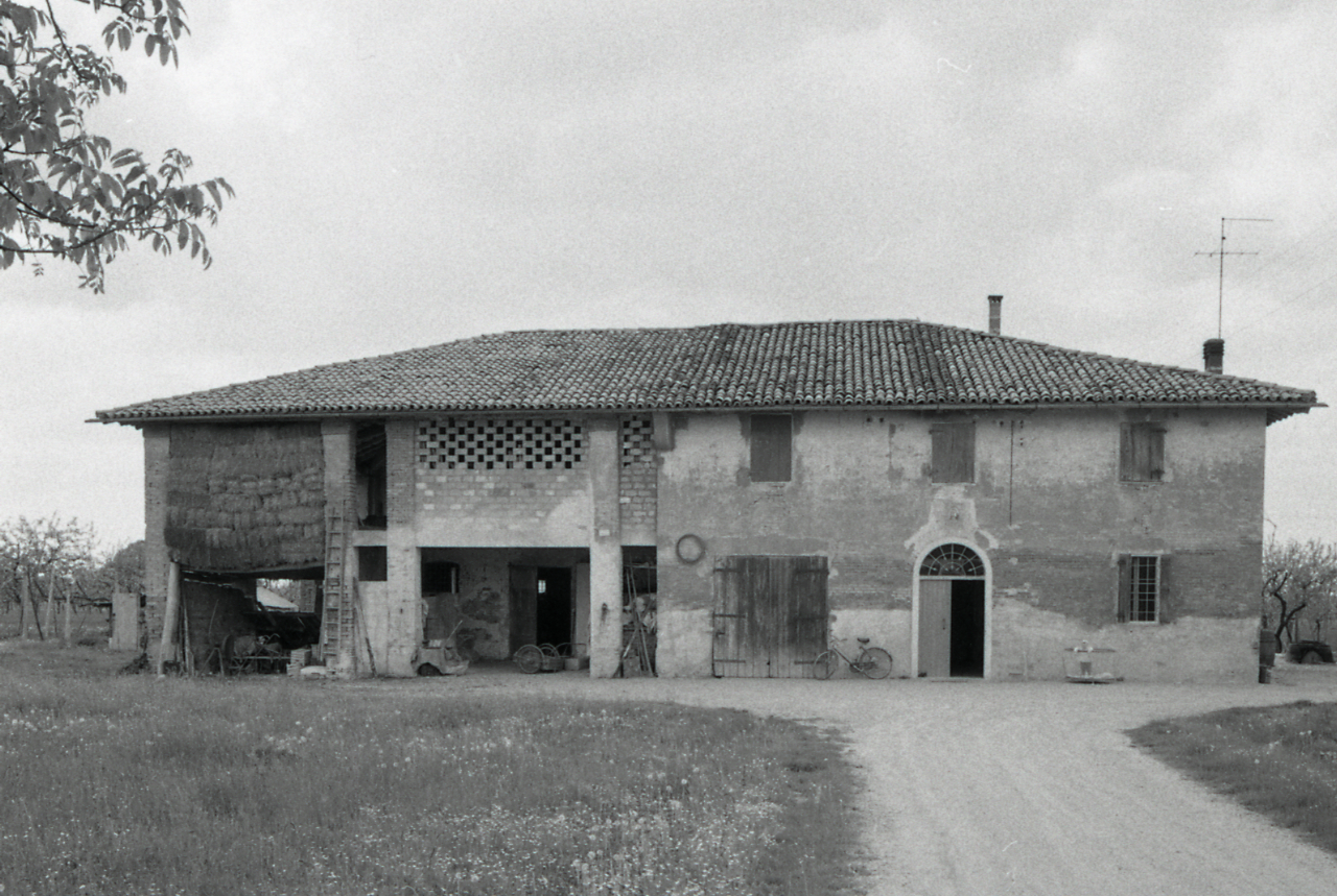 Servizio fotografico : Italia, 1971 / Paolo Monti. - Strisce: 4, Fotogrammi complessivi: 18 : Negativo b/n, gelatina bromuro d'argento/ pellicola ; 35 mm. - ((Sul portanegativi: NIKON Agfa 400 e iscrizione: "37/71 Bologna - restauro Case rurali". - Occasione: Campagna di rilevamento della provincia di Bologna. - , presso Archivio Paolo Monti. - Fonte: Agenda di Paolo Monti: Leica 1501-3000 Controllo numerazione (1950-1978)